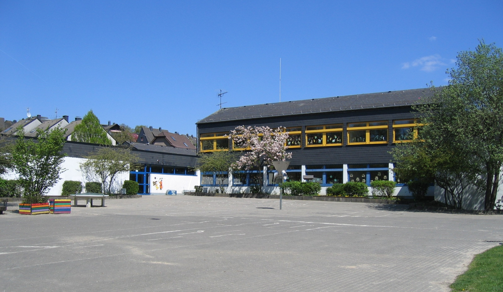 Brabeckschule. Offene Ganztagsschule (Grundschule) in Hemer-Stübecken.